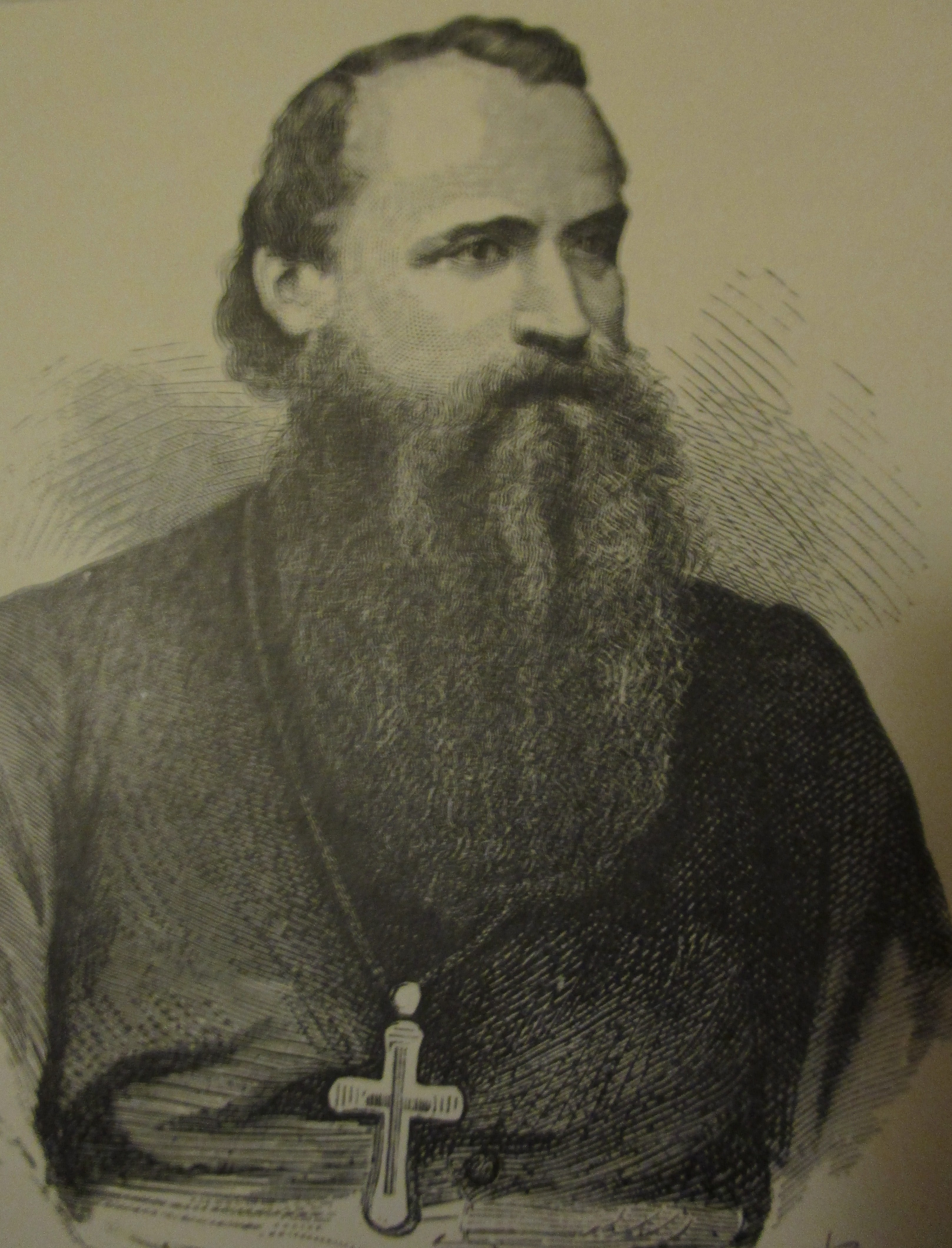 Édouard Dubar (1826-1878), missionnaire en Chine, évêque du Tché-Ly, gravure extraite de En Chine au Tché-Ly Sud-Est par le P. Henri-Joseph Leroy SJ, éd. Desclée de Brouwer, 1900.